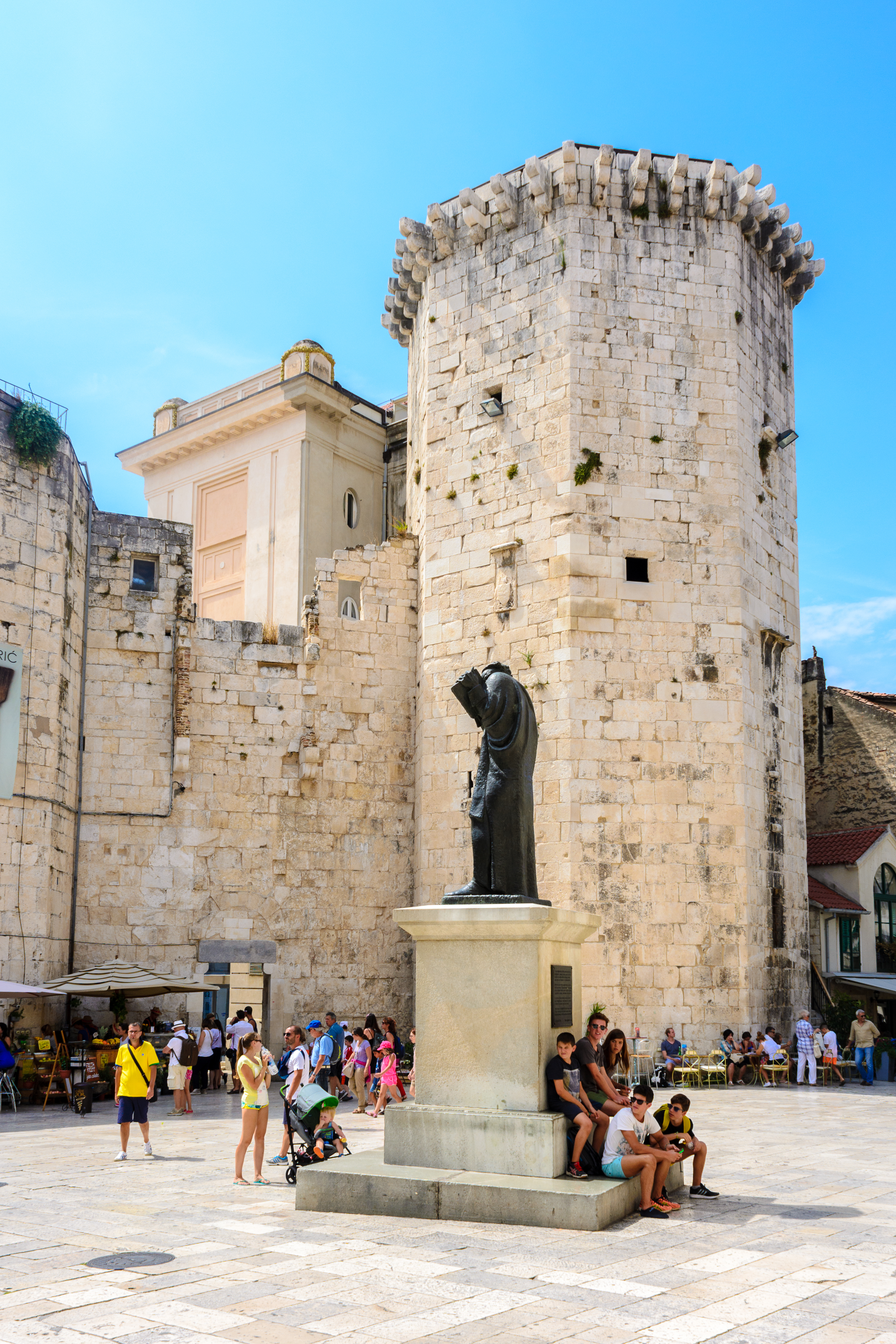 Split